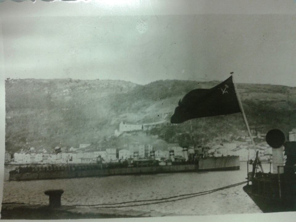 El destructor Velasco, en el puerto de Pajares, habiendo apresado el Smidovich en 1937. D. Francisco Javier de Elizalde y Laínez embarcado de Teniente de Navío.